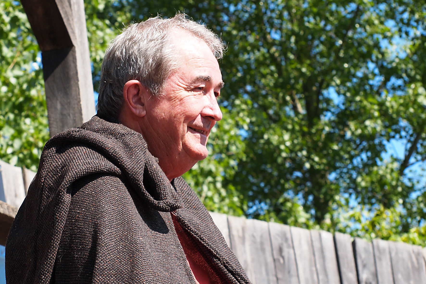 Australisch auteur